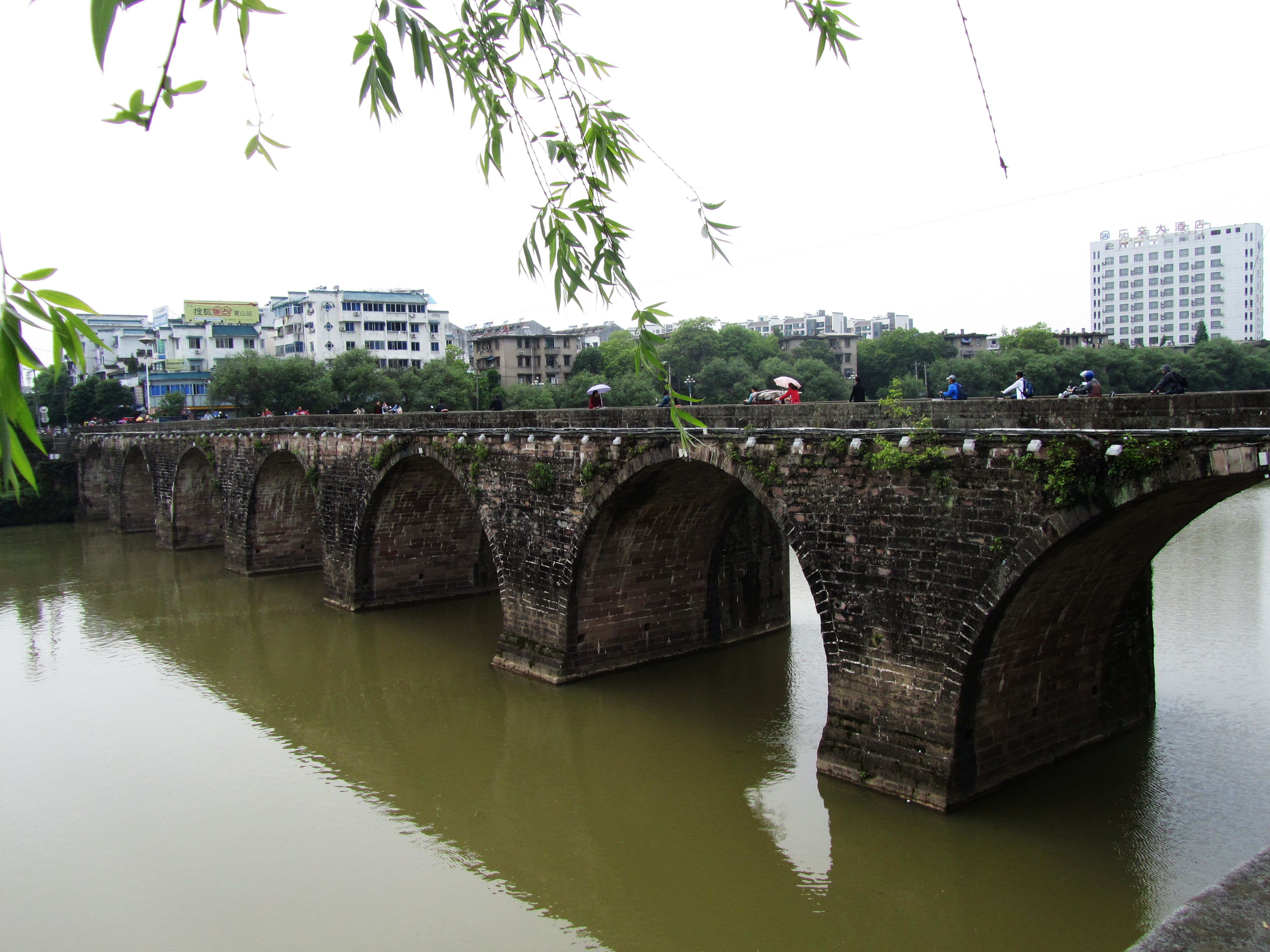 黄山市屯溪区屯溪老街尽头的镇海桥。